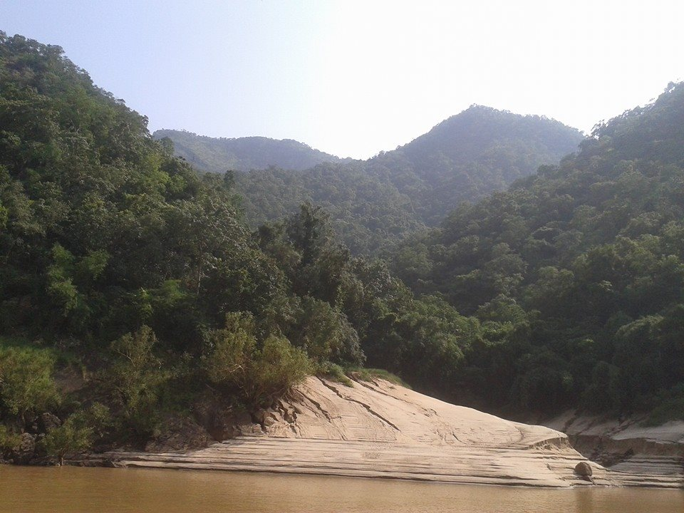 పాపికొండలు